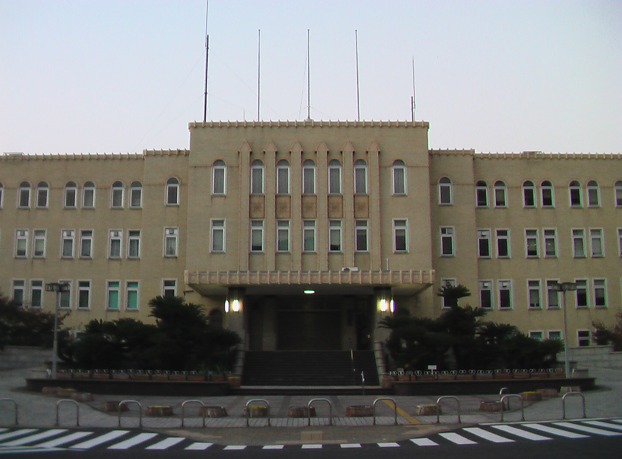 和歌山県庁舎